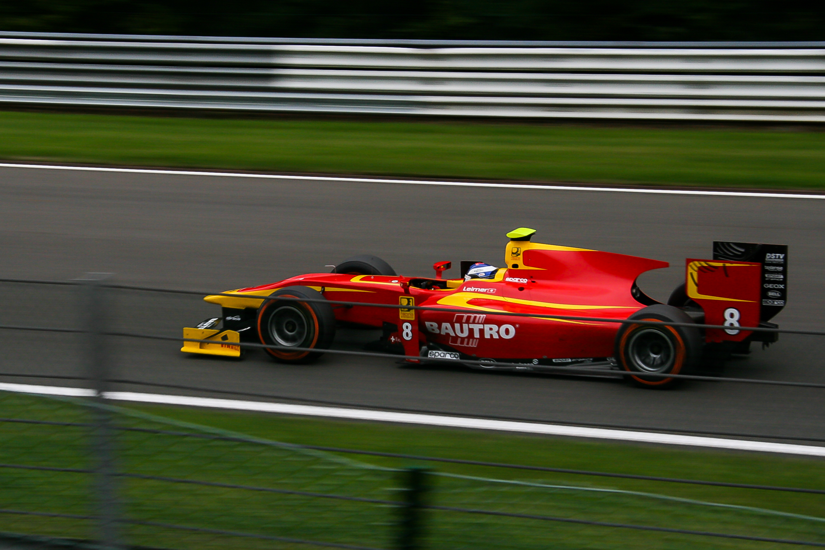 Fabio Leimer beim Hauptrennen im Belgien 2013